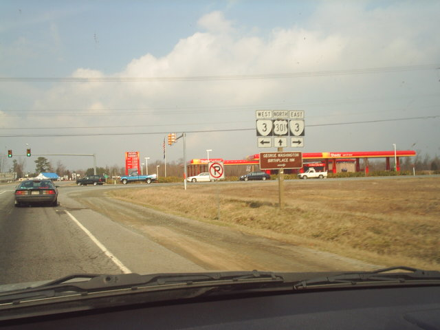 M3367S-4504